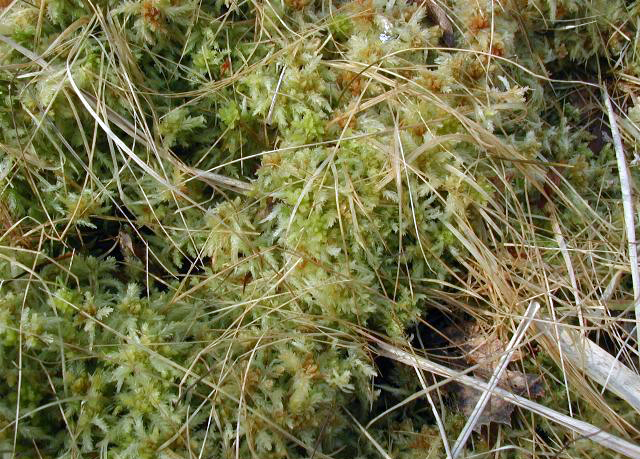 Tørvemos i frodig vækst på en nydannet højmose.